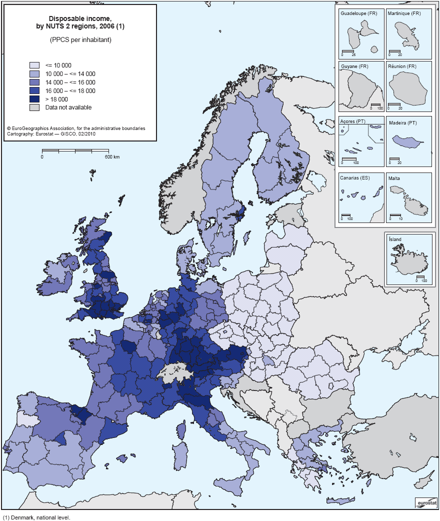 Die Karte zeigt die Einkommensverteilung in den Regionen der EU auf. Die Regionen sind in NUTS 2 eingeteilt. Je dunkler die Farbe, desto höher ist das durchschnittliche verfügbare Einkommen in der Region.